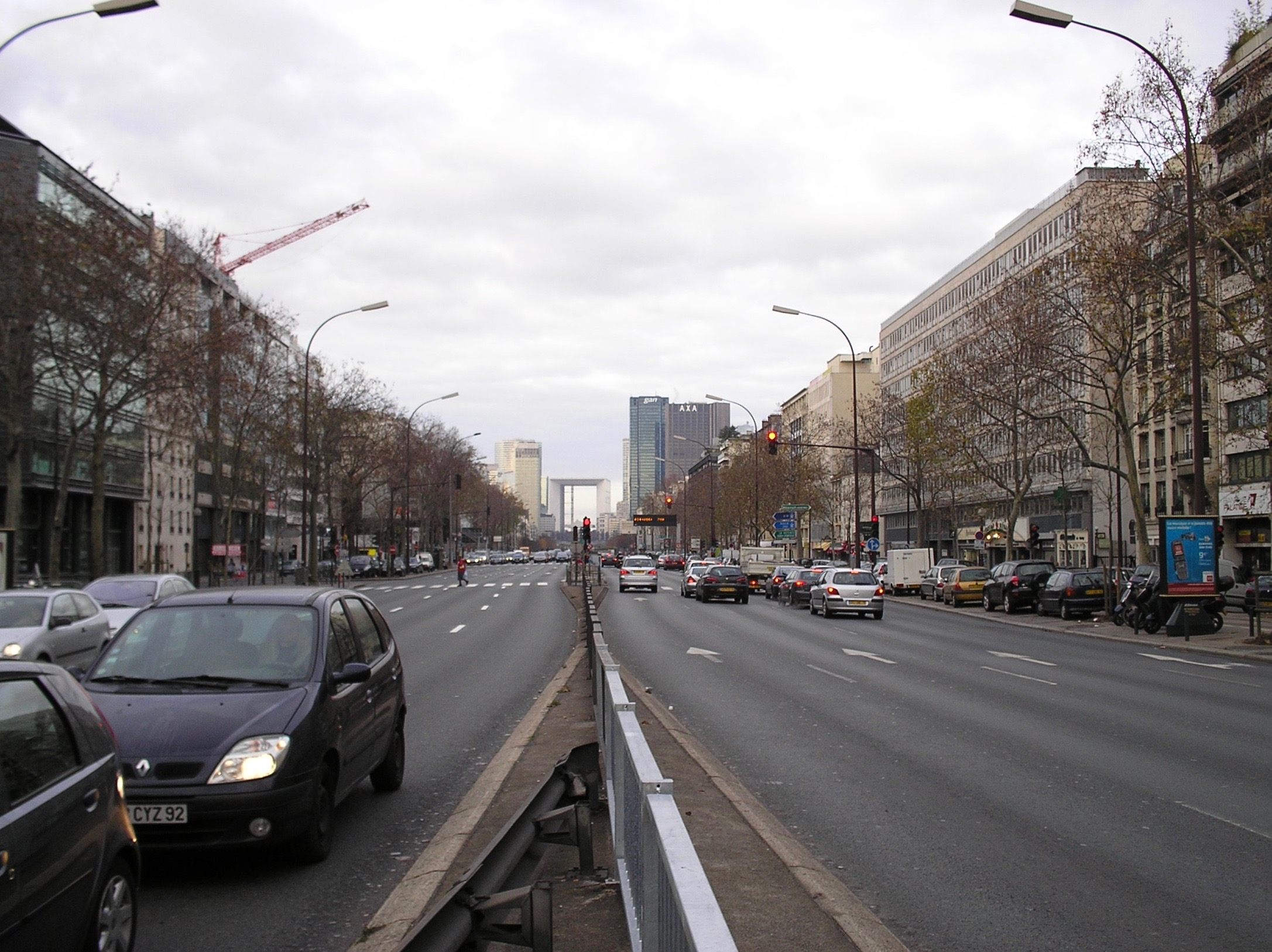 Vue de l'Avenue Charles de Gaulle à Neuilly direction la Défense